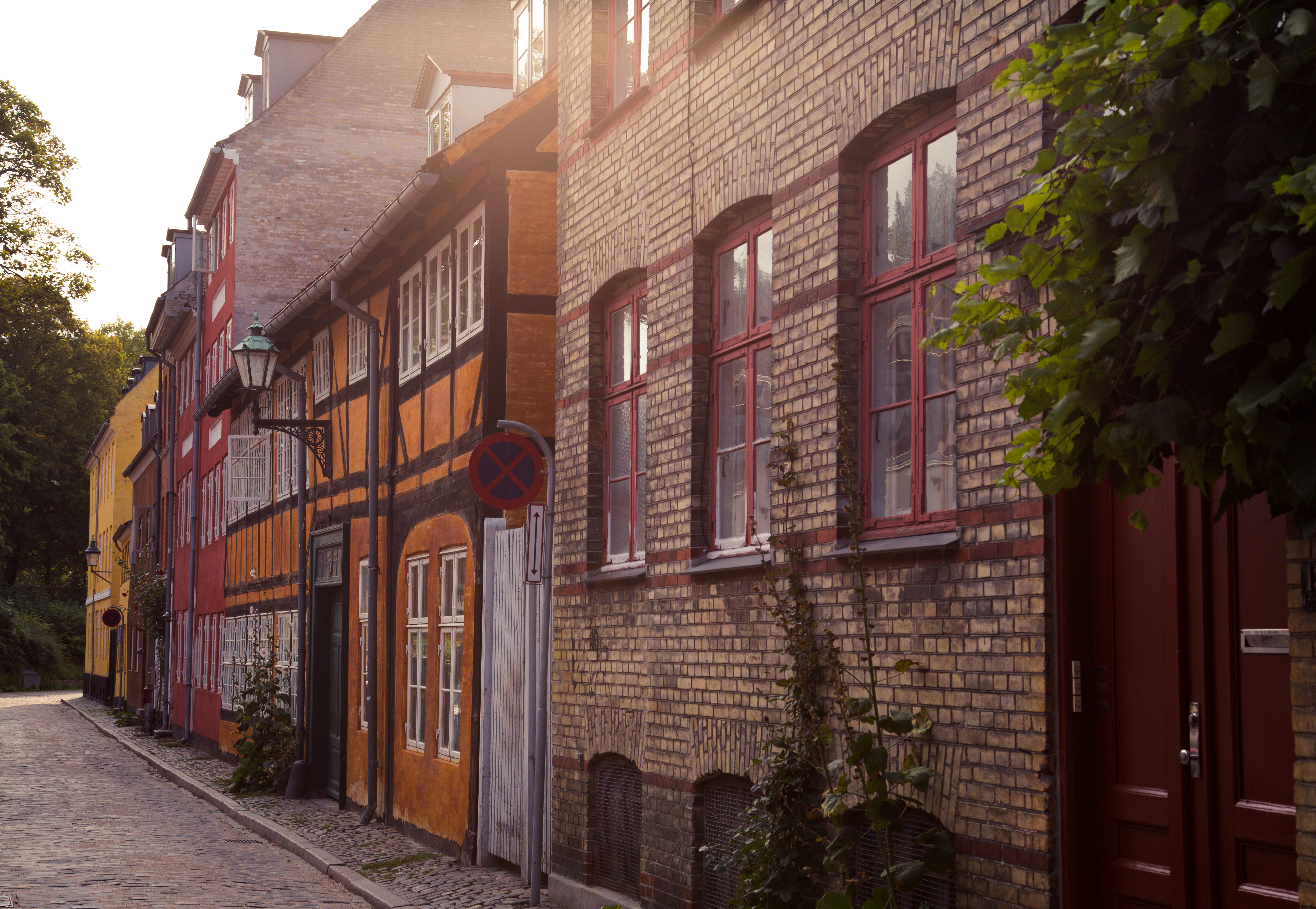 Copenhagen, Denmark Licensing